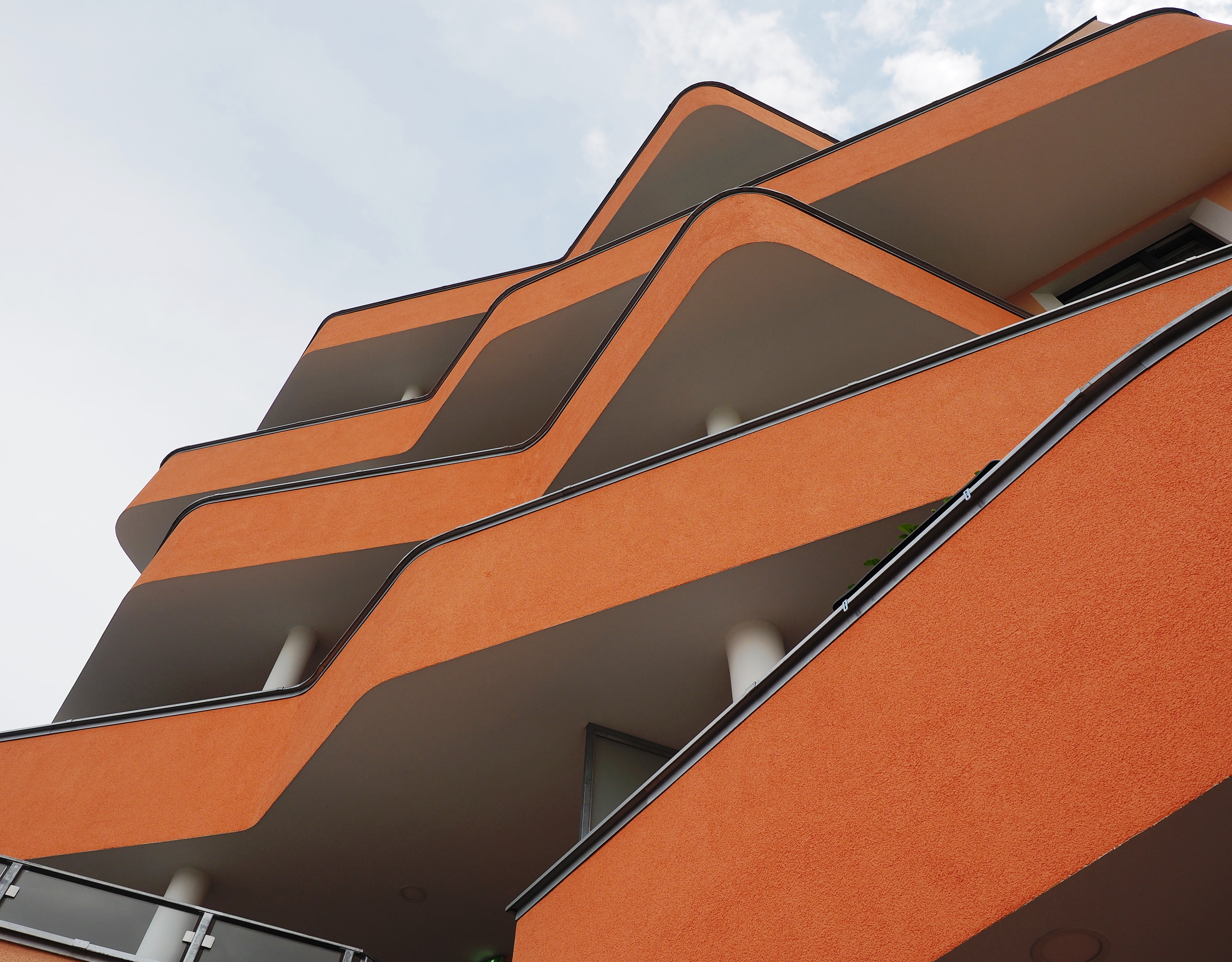 RLP Rüdiger Lainer + PartnerWohnhausanlage Sonnwendviertel 2, Bauteil Ost, Terrassen, Wien 2017